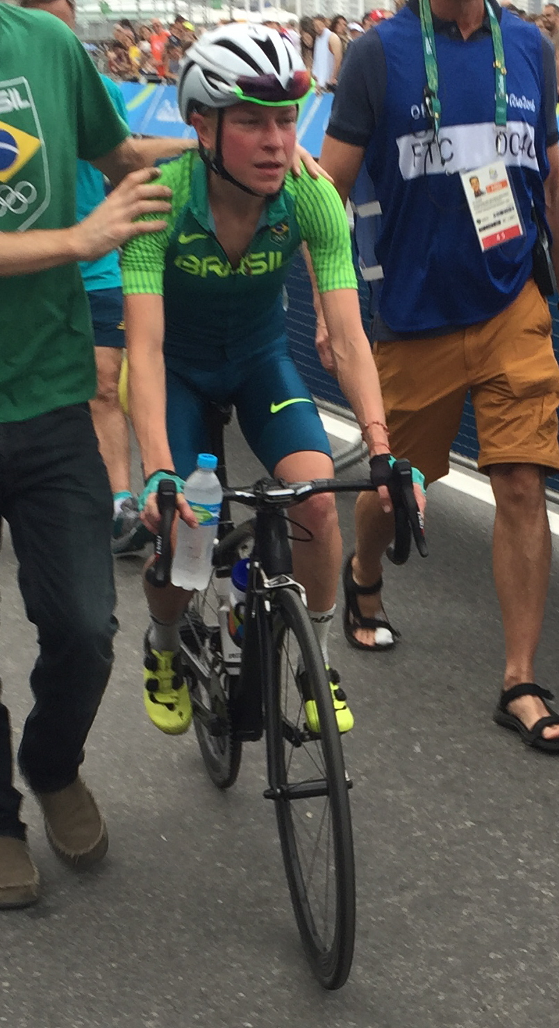 Ciclista brasilera Flávia Oliveira